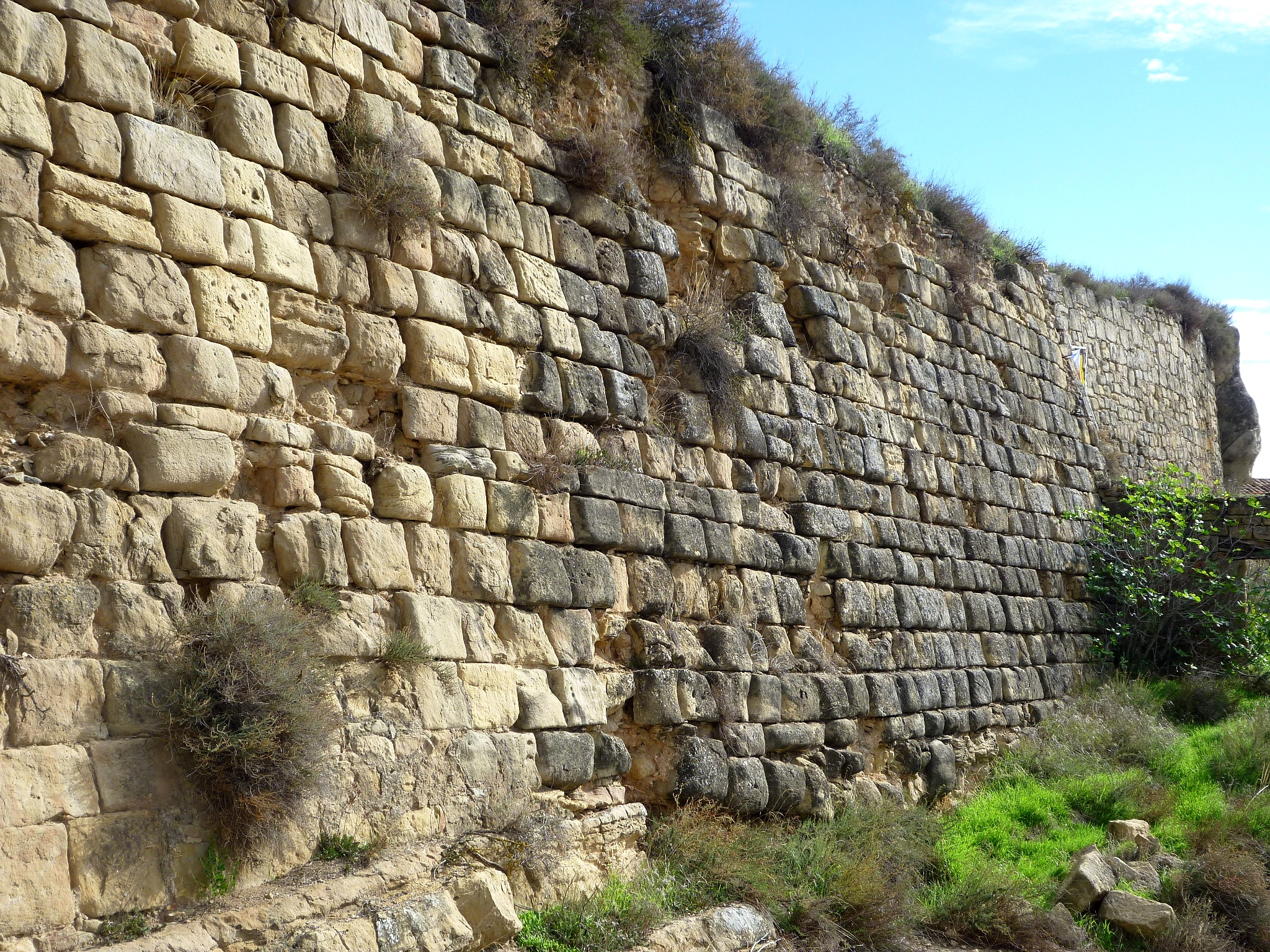 Castell de Biosca: pared de la base sud